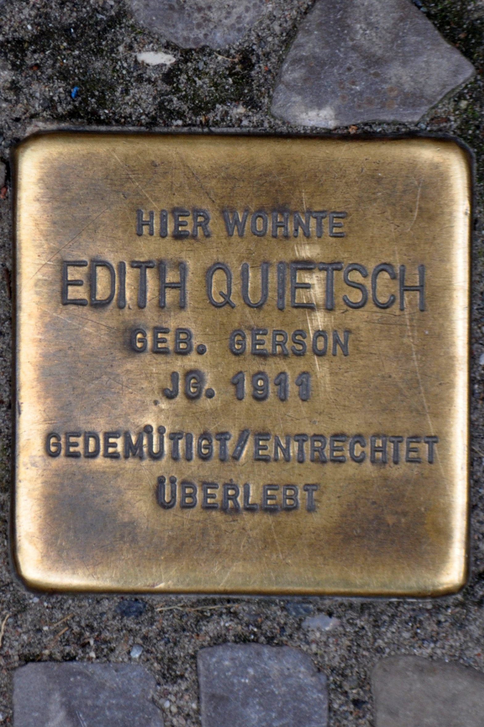 Stolperstein in Stralsund, Mönchstraße. Text: Hier wohnte Edith Quietsch geb. Gerson Jg. 1911 gedemütigt/entrechtet überlebt